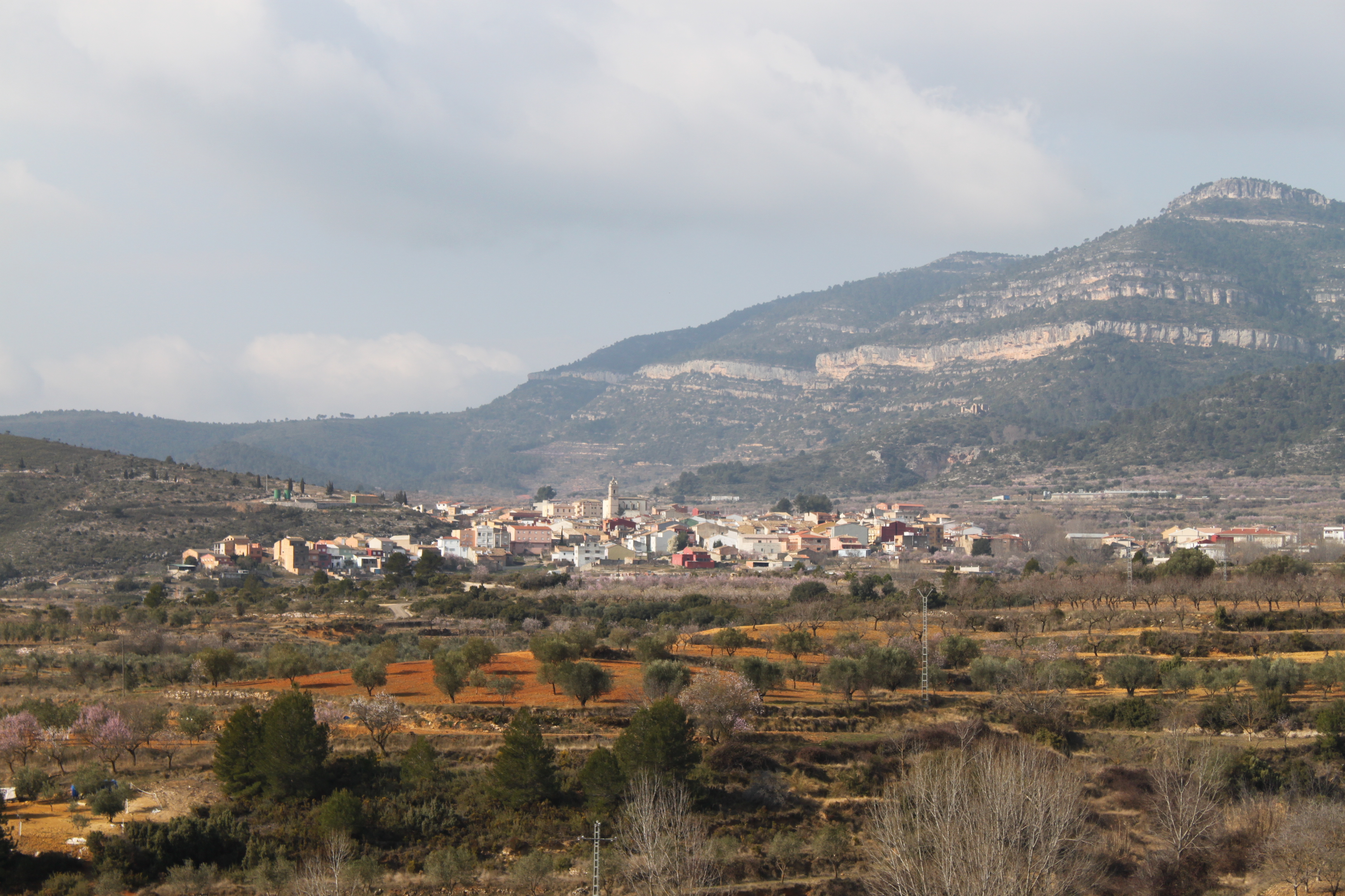 Vistas de Chera, provincia de Valencia, Comunidad valenciana, España